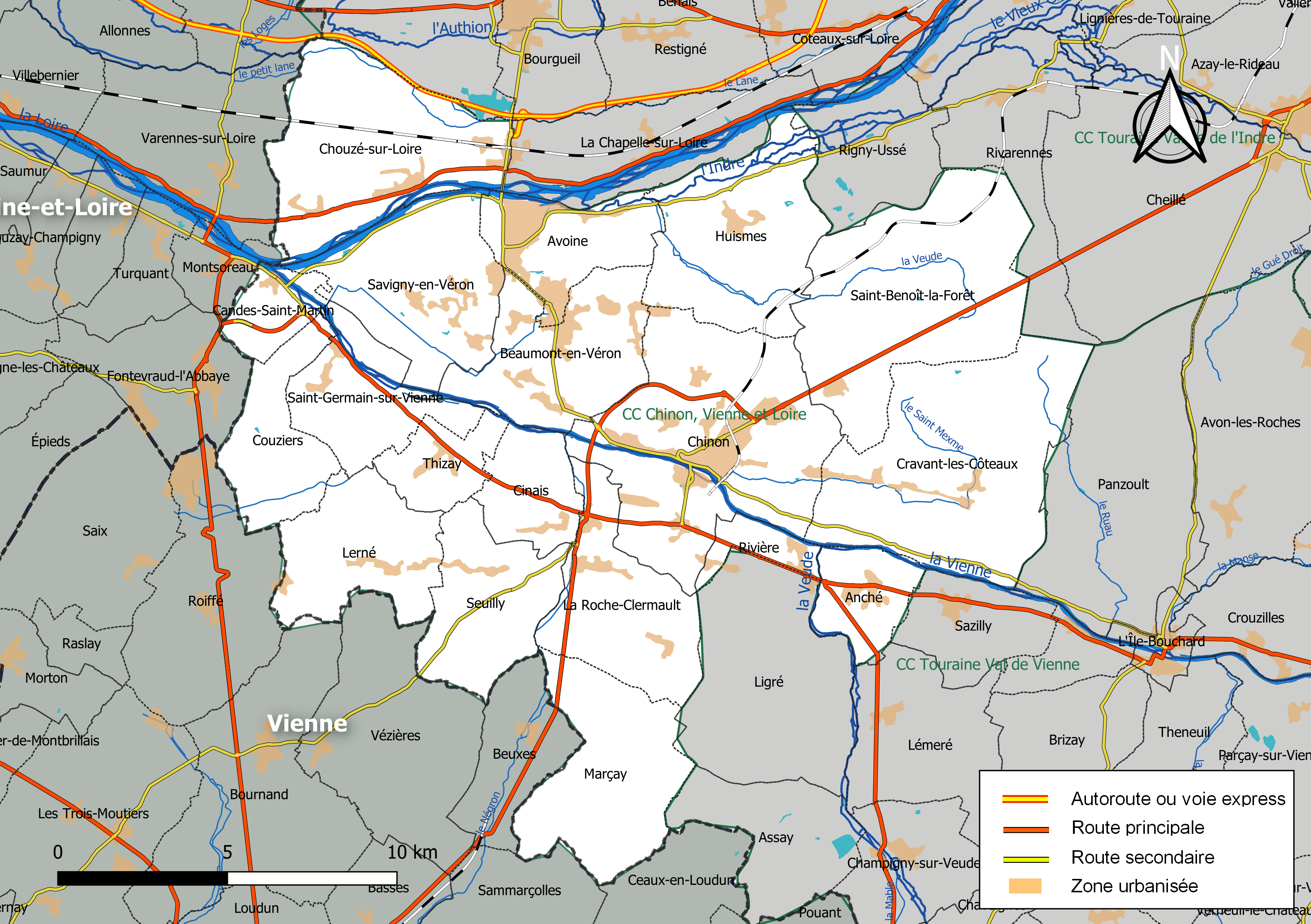 Carte de la communauté de communes Chinon, Vienne et Loire, département d'Indre-et-Loire, France. Composition au 1er janvier 2019.